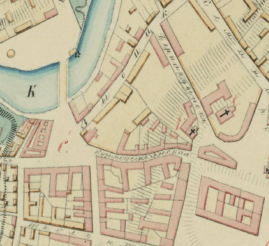 Беларуская (тарашкевіца): Менск (Miensk), Цёмныя Крамы (Ciomnyja Kramy). Плян